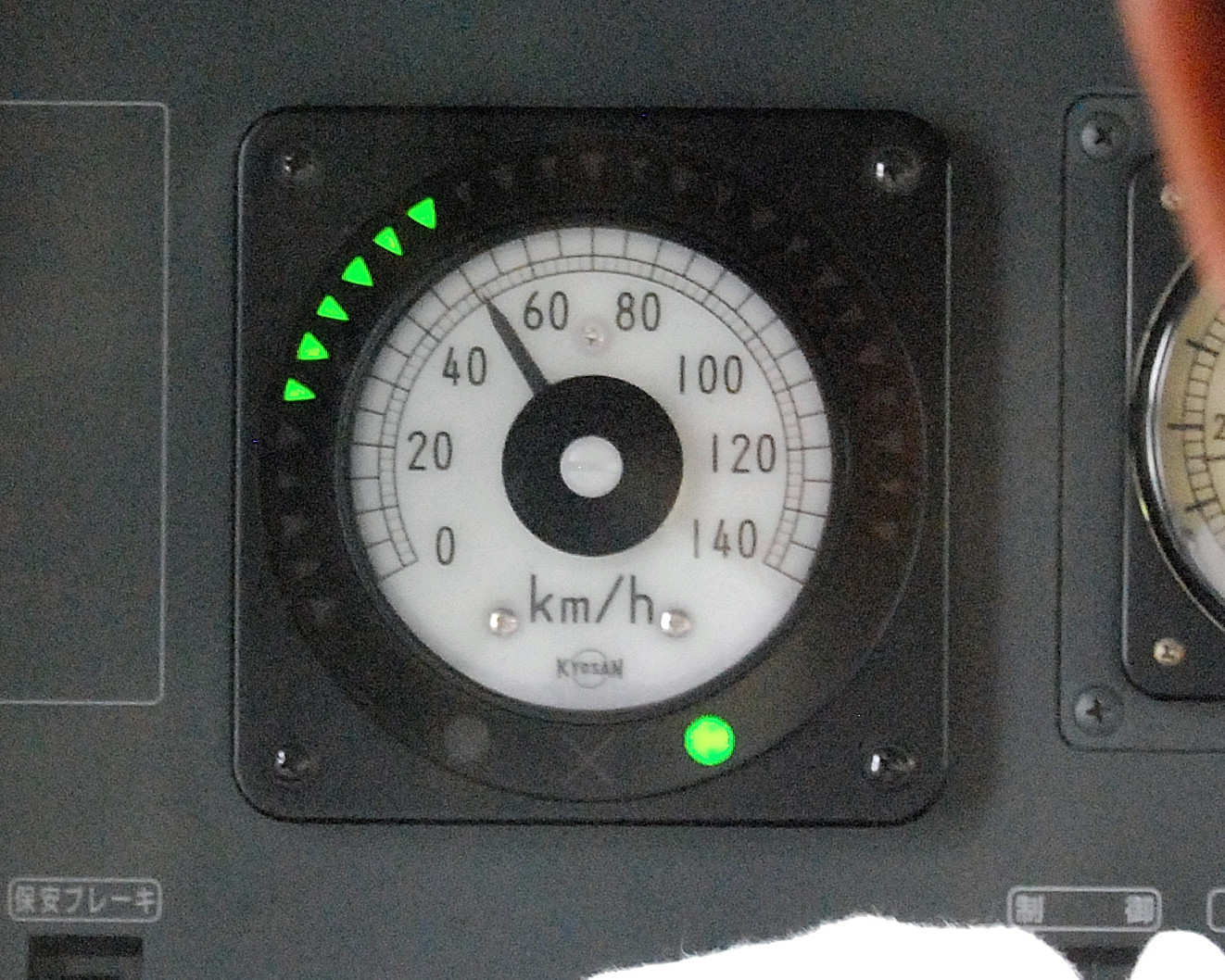 京王ATCの車内信号（乗務員室の窓越しから撮影後トリミング）